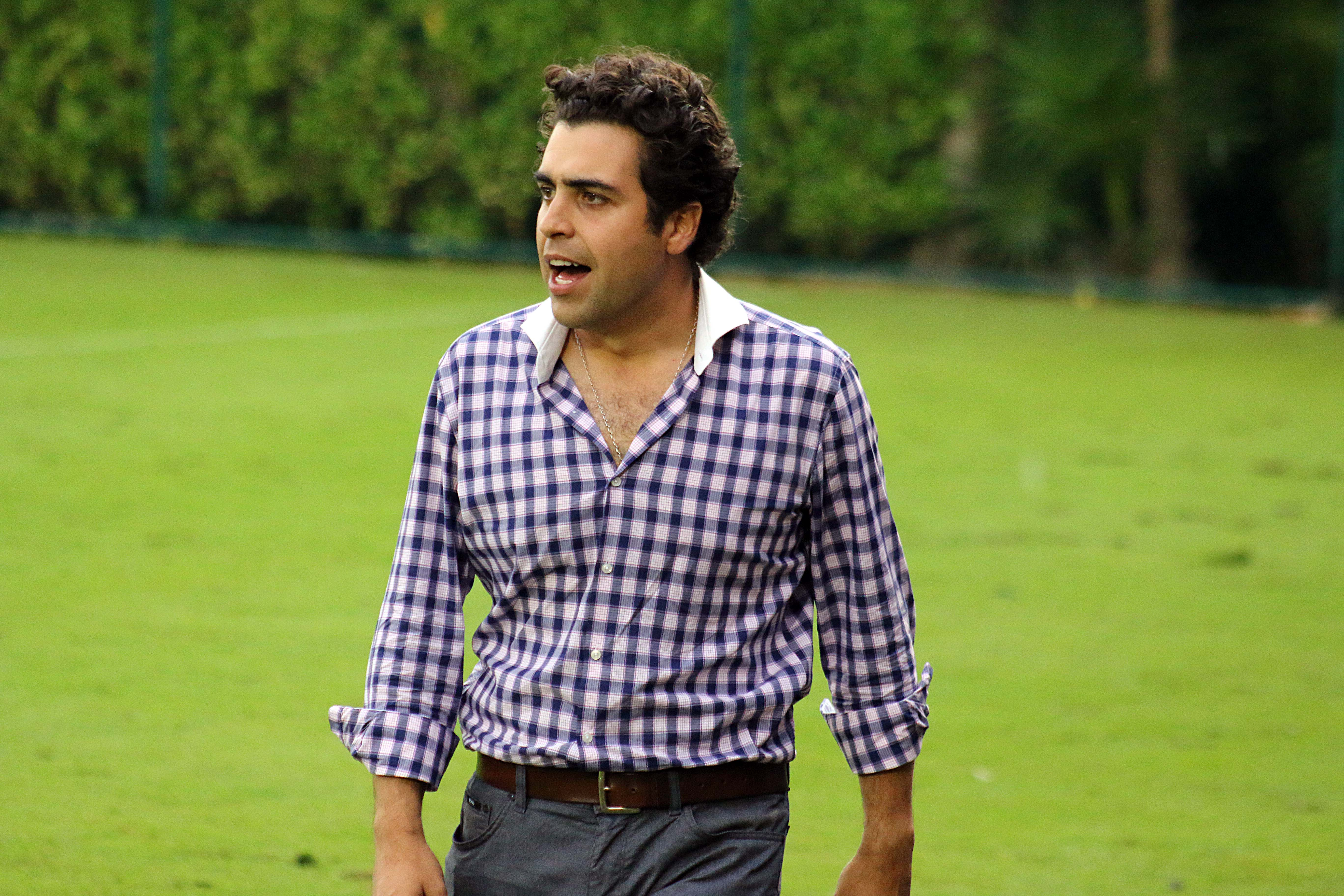 Director Técnico